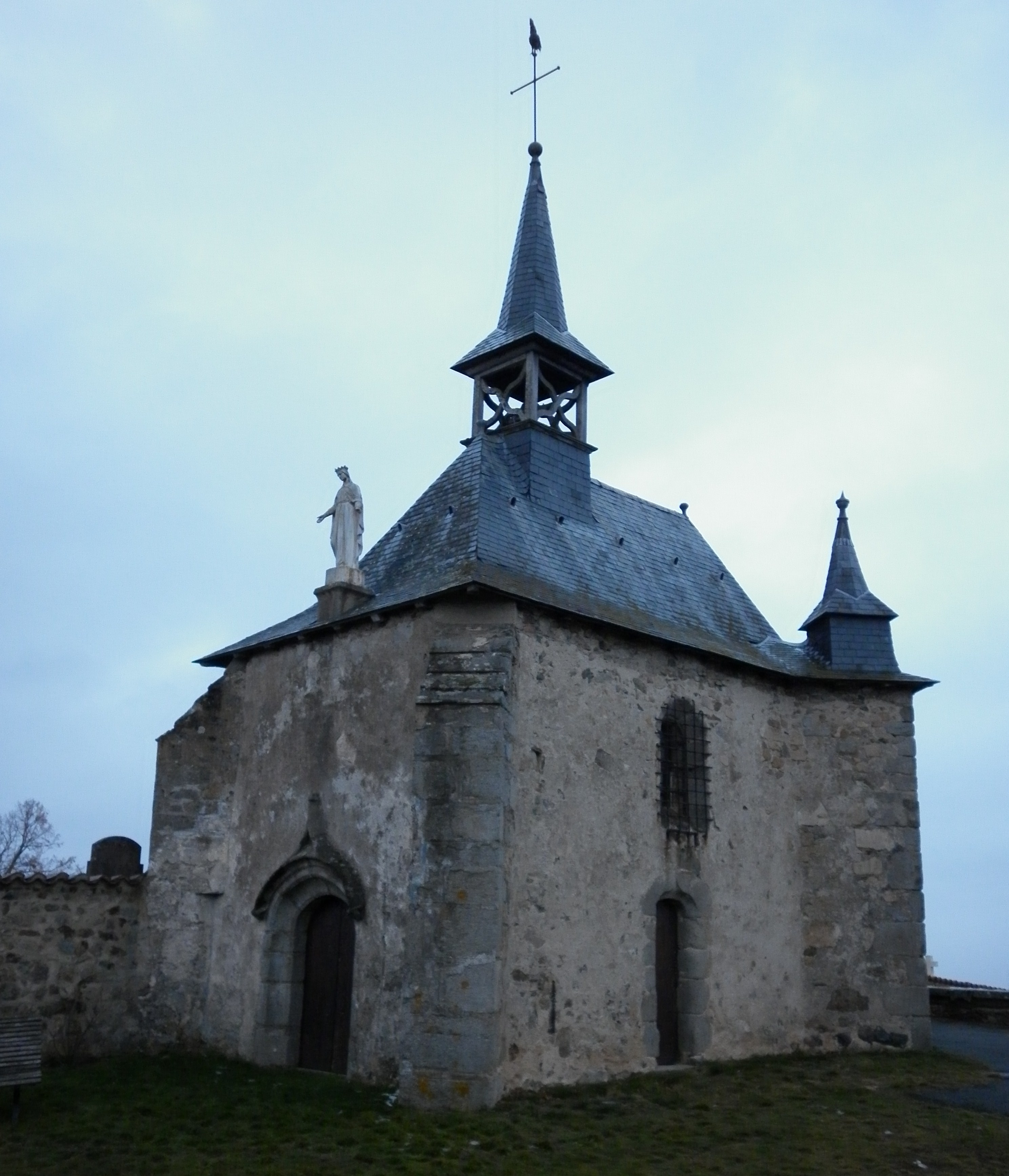 Chapelle Sainte-Barbe de Grézolles